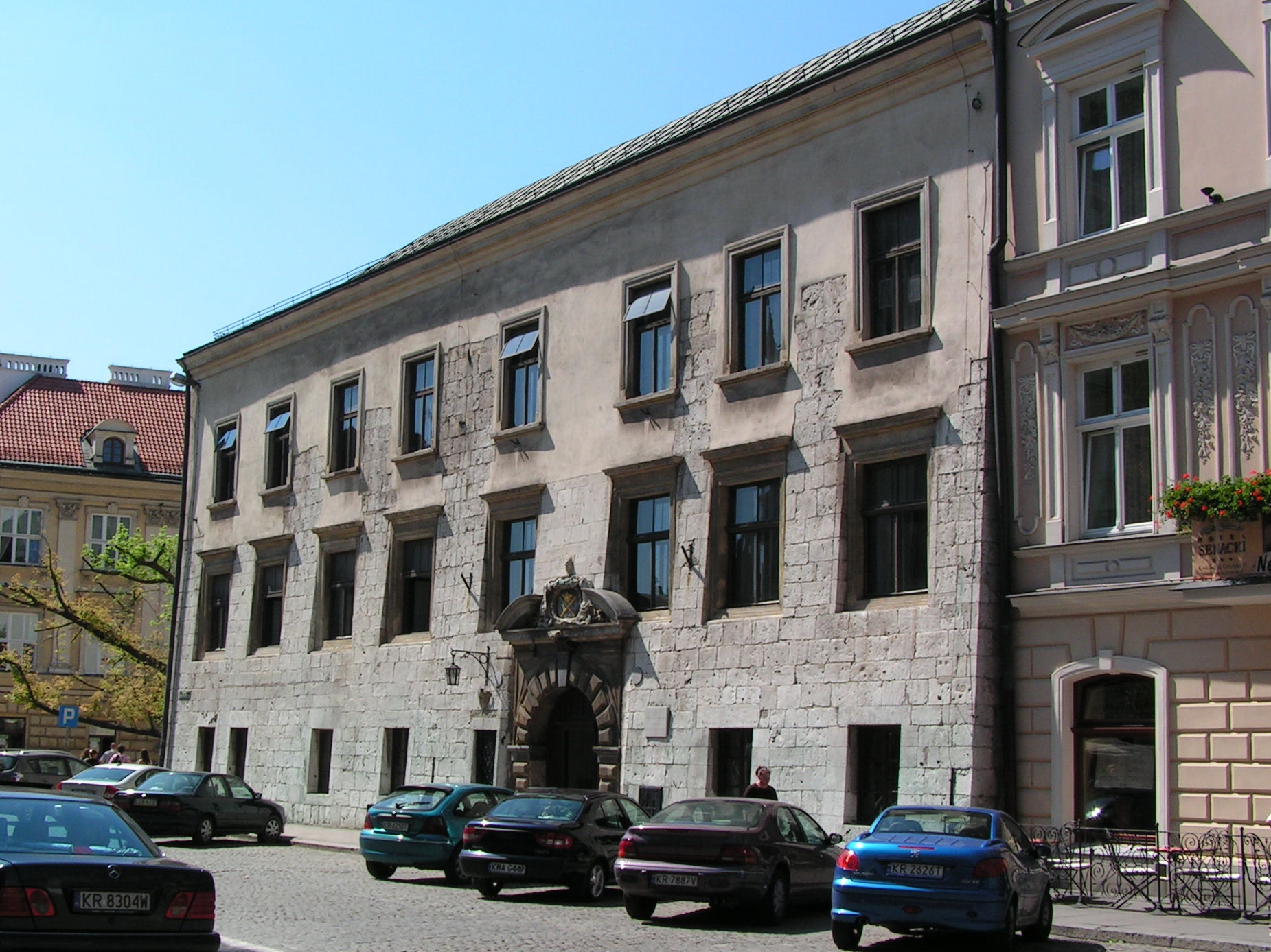 Collegium Iuridicum, Kraków